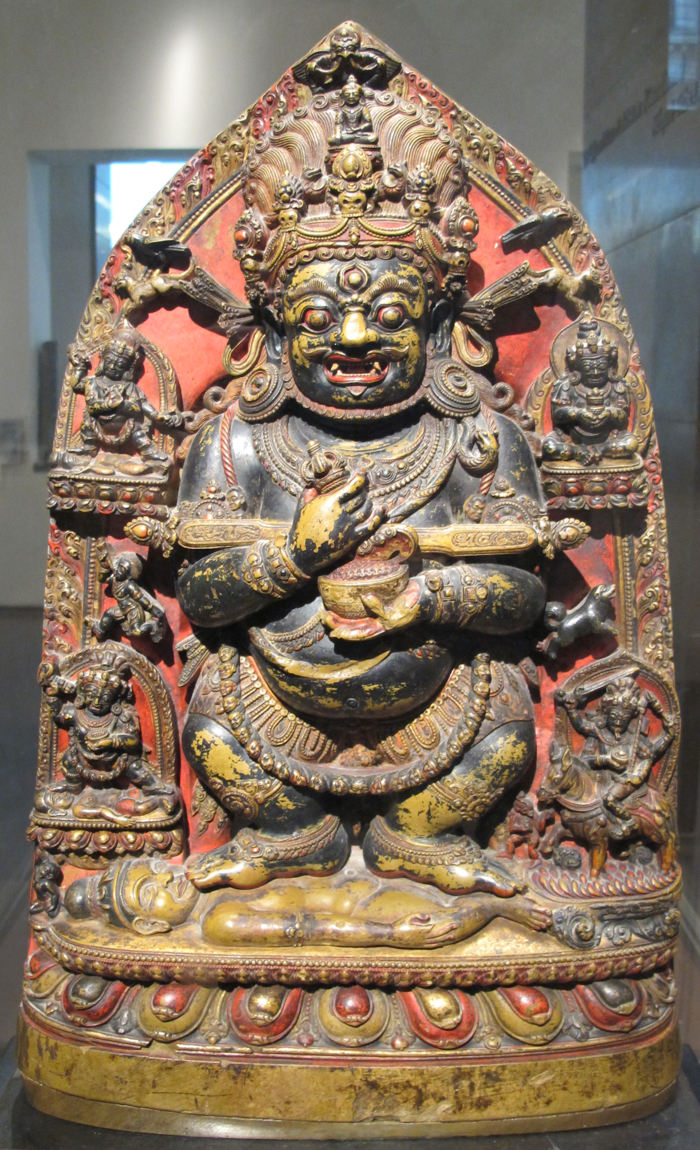 Tibet, mahakala, guardiano della dottrina sotto l'aspetto gur-gyi mgon-go, 1292